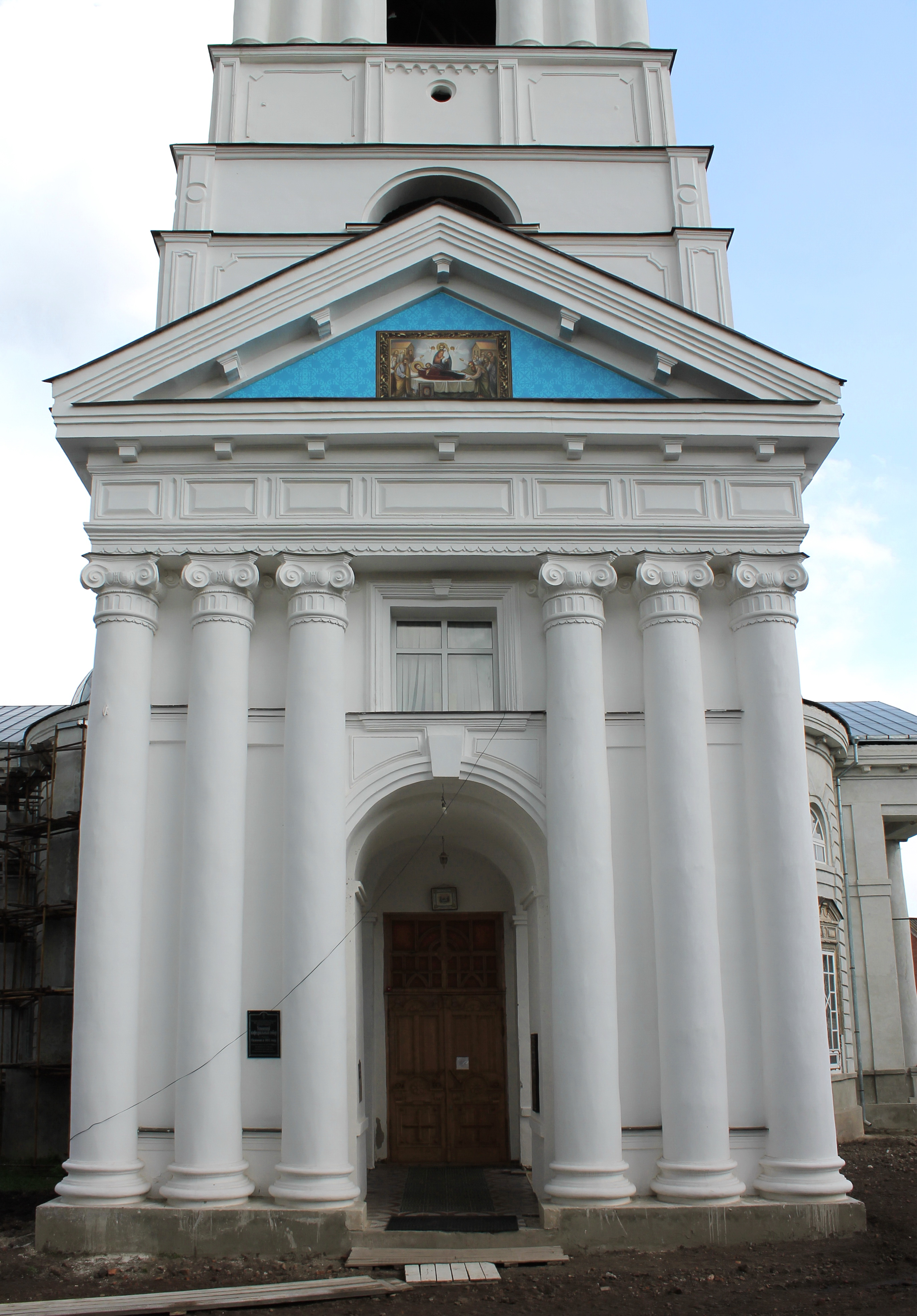 1 ярус колокольни Успенского собора в Рыльске